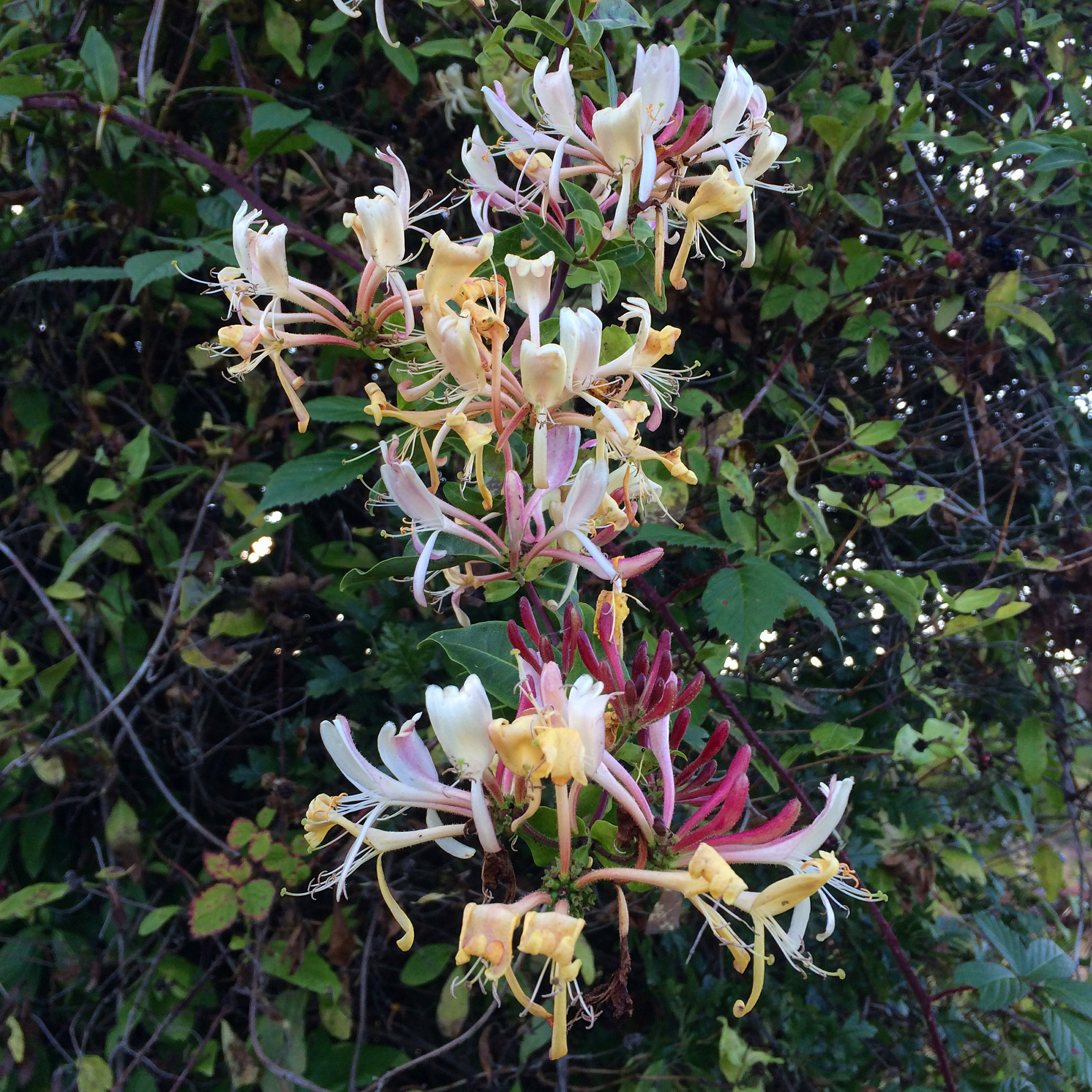 Blodau'r gwyddfid ger Heolgerrig, Merthyr Tudful.